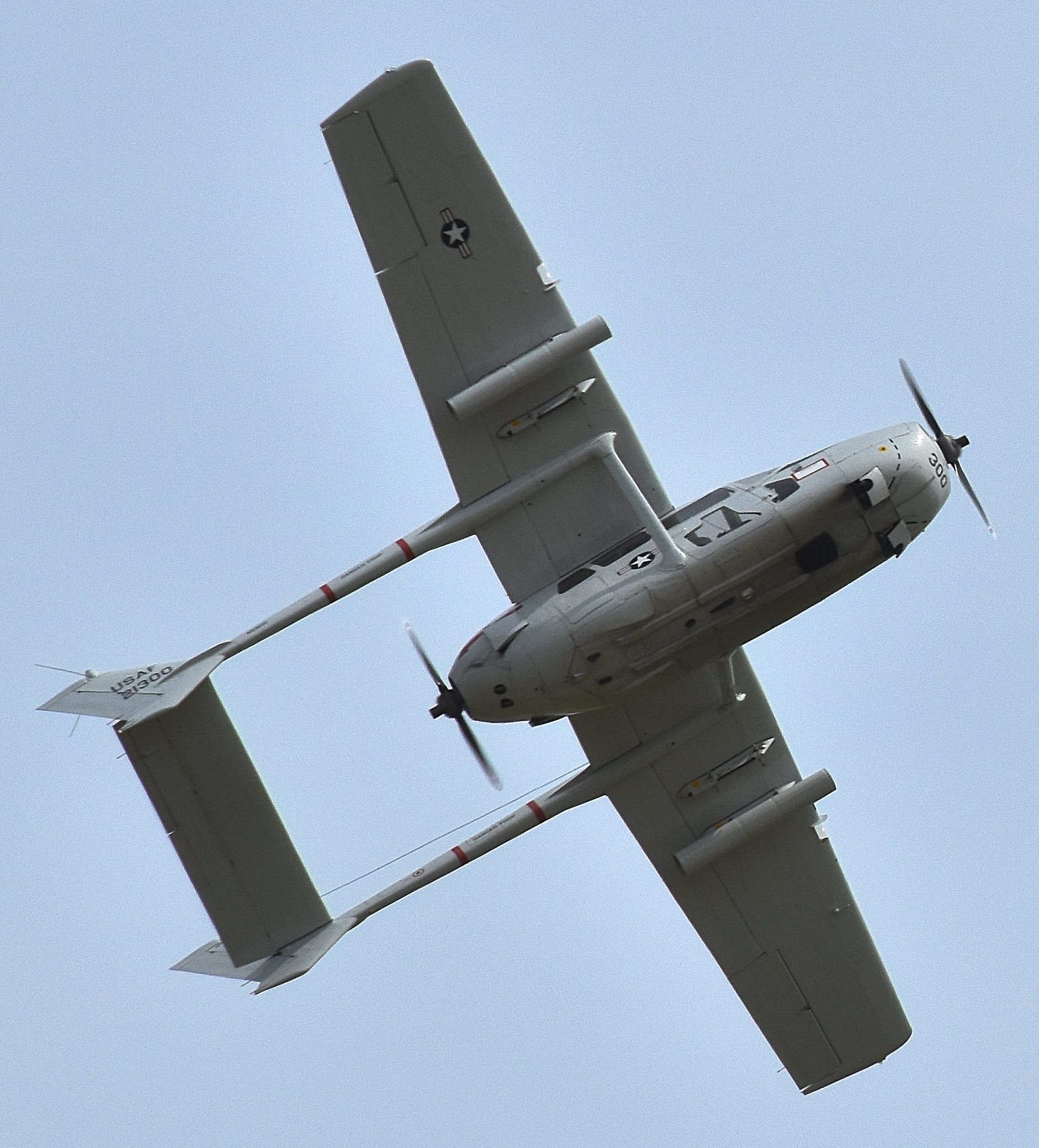 Texel Air Show 2015 De Cessna O-2A kent haar oorsprong in het midden van de Vietnam-oorlog, toen de Amerikaanse strijdkrachten een betrouwbaar en rugged toestel zochten voor Forward Air Control, het opsporen en markeren van gronddoelen voor de grote, snelle en hoogvliegende bommenwerpers. Tussen 1967 en 1970 produceerde Cessna in Wichita ruim vijfhonderd O-2's. Het exemplaar van de Stichting Postbellum (registratie N590D) is gebouwd in 1967 en heeft bijna drie jaar dienst gedaan in Vietnam onder registratie USAF 21-300, waarna ze terug werd gevlogen naar de Verenigde Staten. Bron